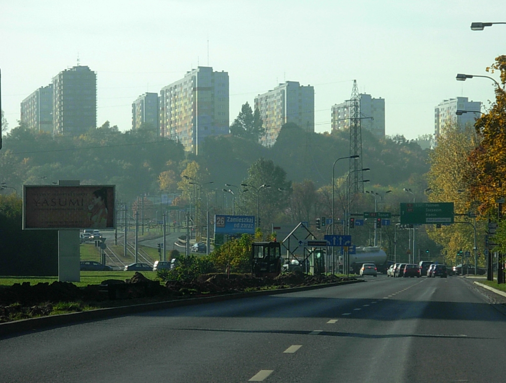 Aleja Stefana Wyszyńskiego w Bydgoszczy, w tle Zbocze Bydgoskie na osiedlu Wyżyny